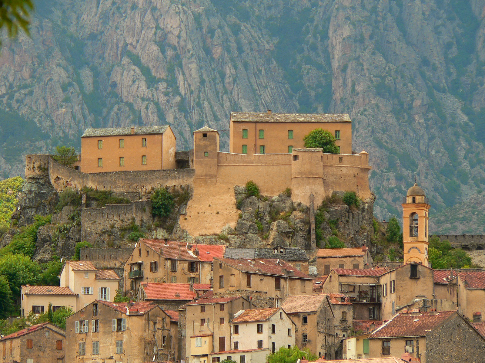 La citadelle